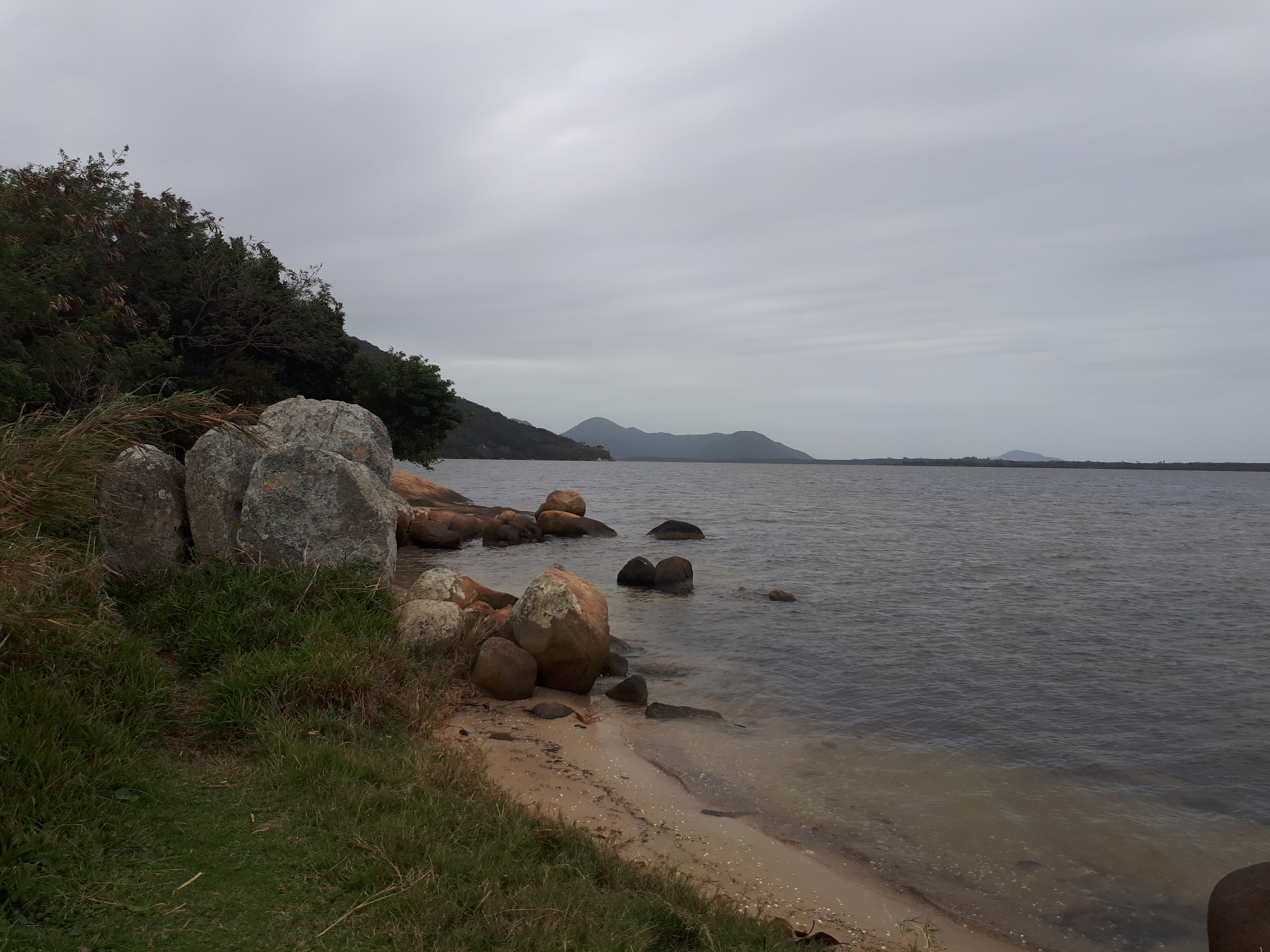 Sítio Arquelógico Ponta das Almas na Lagoa da Conceição Vista Norte